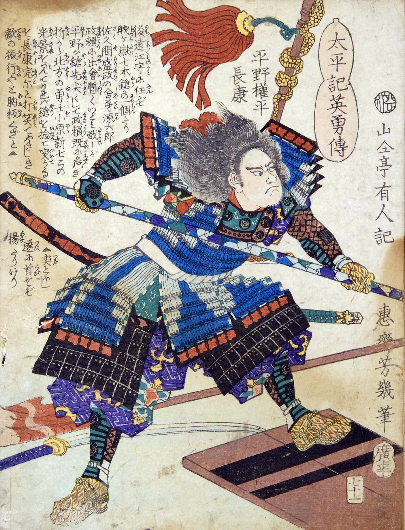 「太平記英勇伝七十一：平野権平長康」